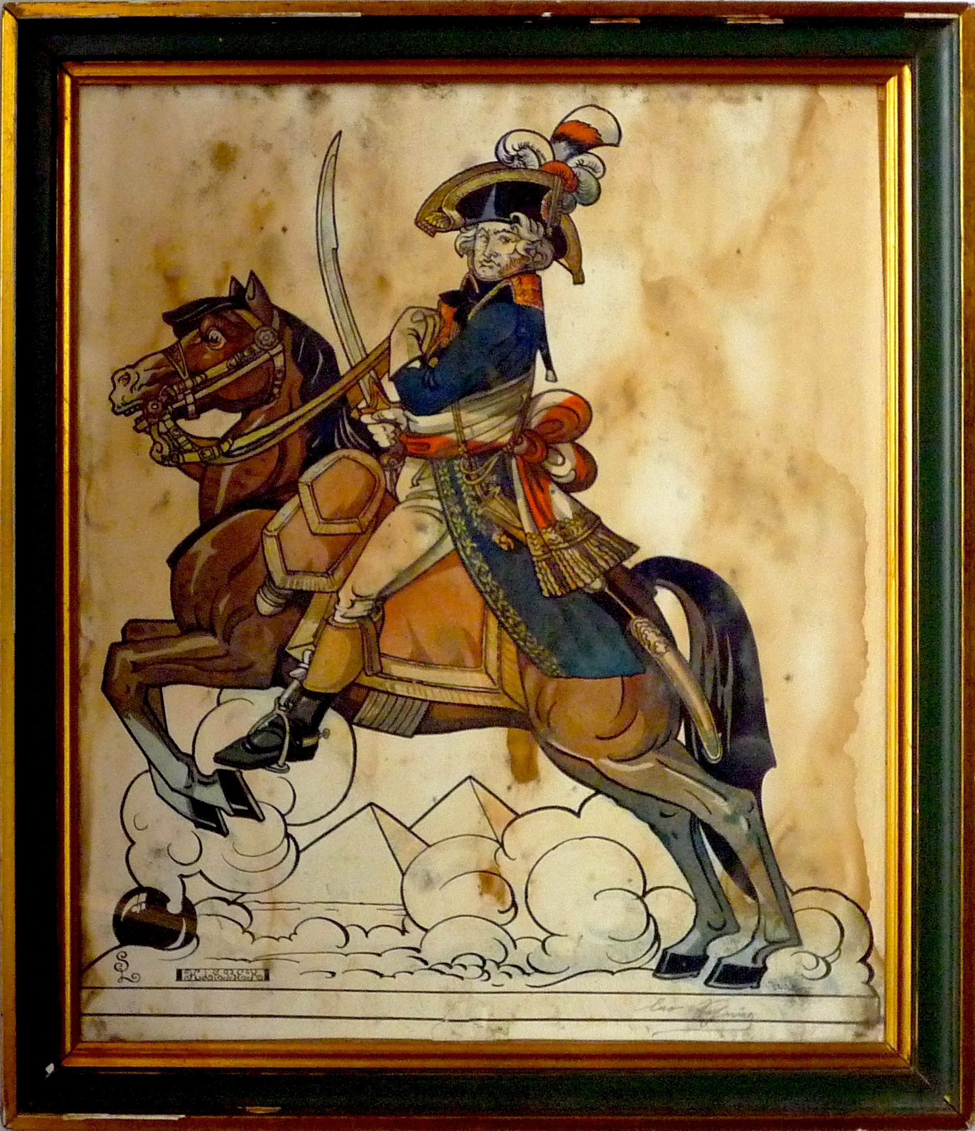 Kléber par Léo Schnug , images à découper du Musée Alsacien, Strasbourg, 1908.